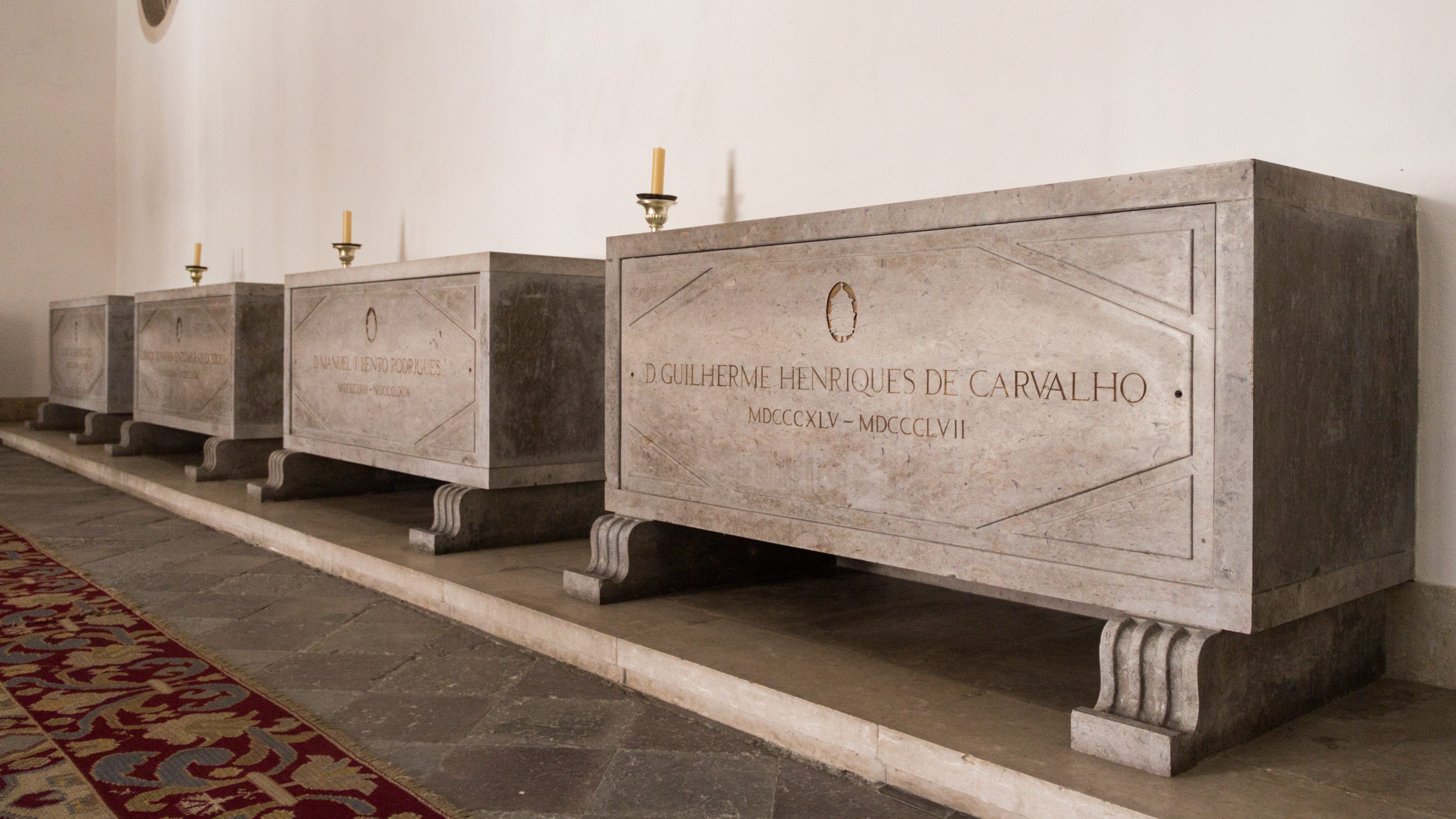 Igreja de São Vincente